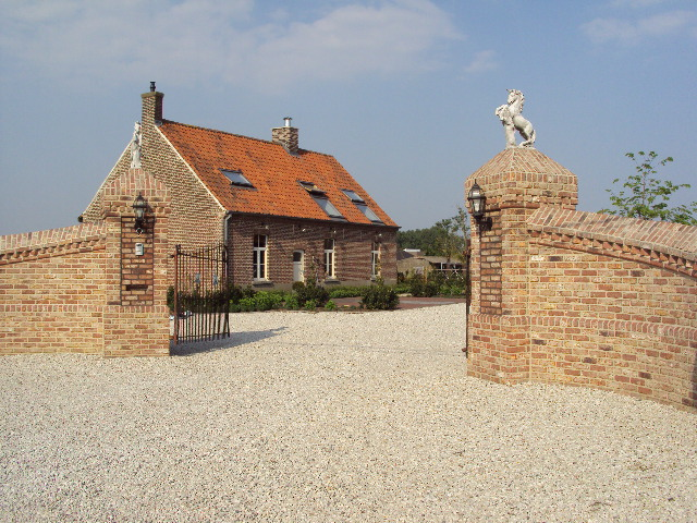 Onroerend erfgoed in Aalter: hoeve Kleitestraat nr. 9